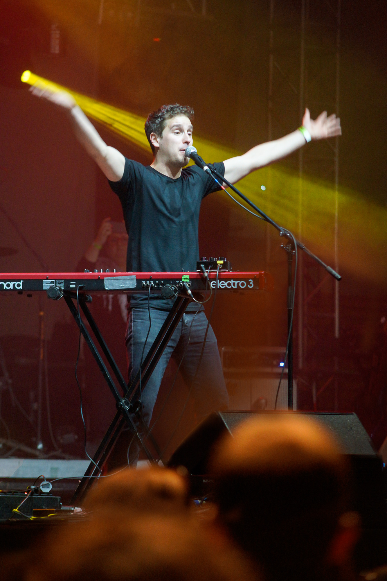 Krzysztof Zalewski z zespołem podczas Rocket Festiwal 2014 w Warszawie.